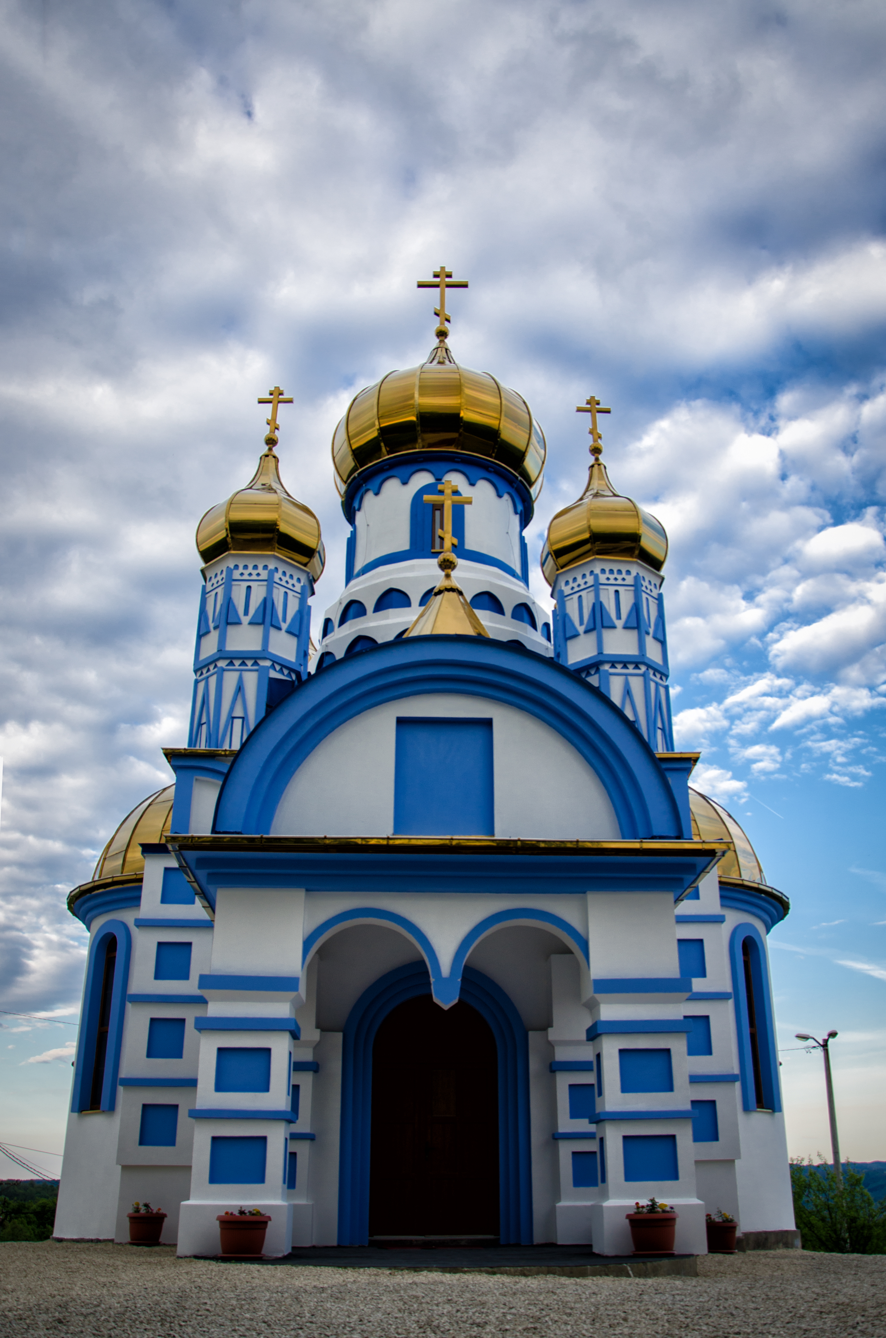 Манастир блаженој МАТРОНИ МОСКОВСКОЈ, Ритешић